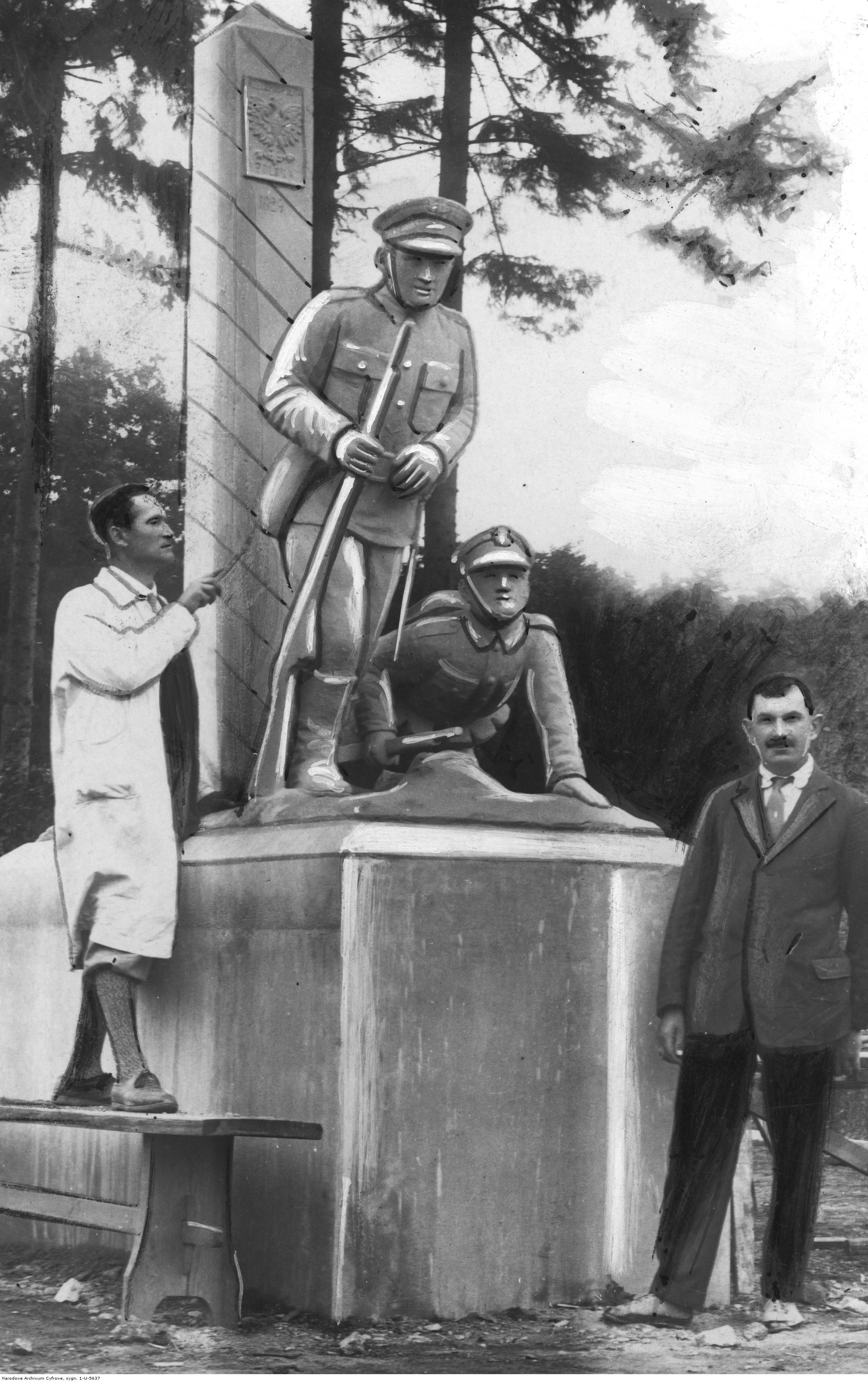 Sapożyn. Pomnik wdzięczności ludności kresowej dla Korpusu Ochrony Pogranicza; 1930 r. Koncern Ilustrowany Kurier Codzienny - Archiwum Ilustracji. Sygnatura 1-U-5637